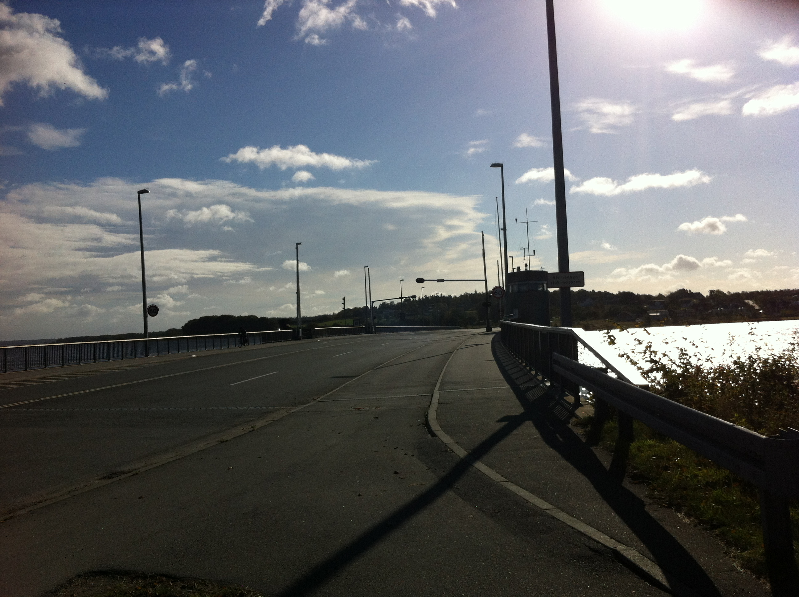 Billedet viser Hadsundbroen men med de 4 spor